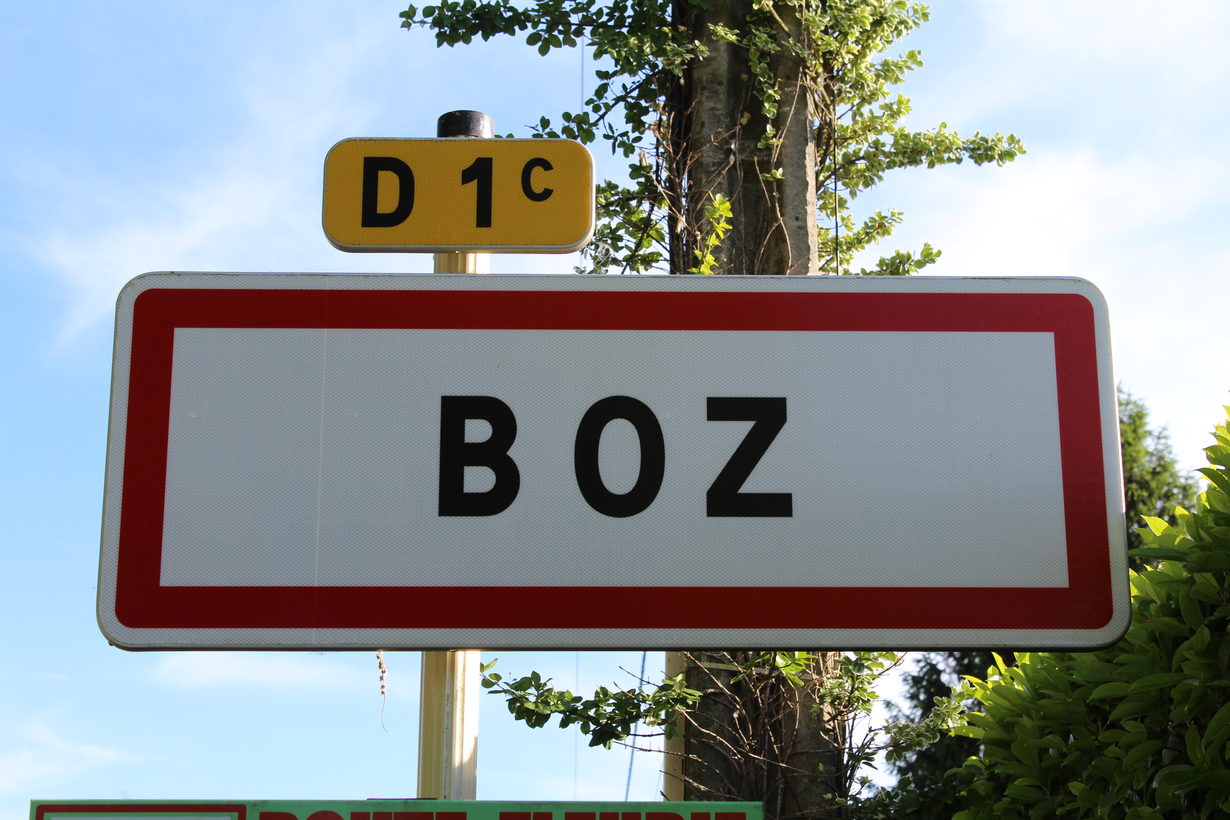 Panneau d'entrée dans Boz depuis Reyssouze.